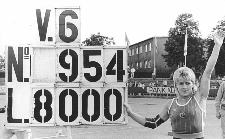 Petra Felke ADN-ZB Oberst 9.9.88 Potsdam: DVfL-Sportfest- Vizeweltmeisterin Petra Felke (SC Motor Jura) verbesserte in Potsdam den Speerwurf-Weltrekord auf 80,00 m und übertraf damit die von ihr selbst gehaltene Bestmarke gleich um 1,10 m.